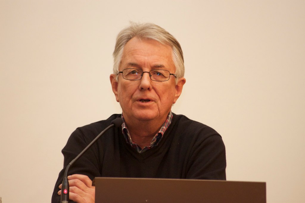 Oslo Venstres nominasjonsmøte 2010. Foto: Kjartan Almenning